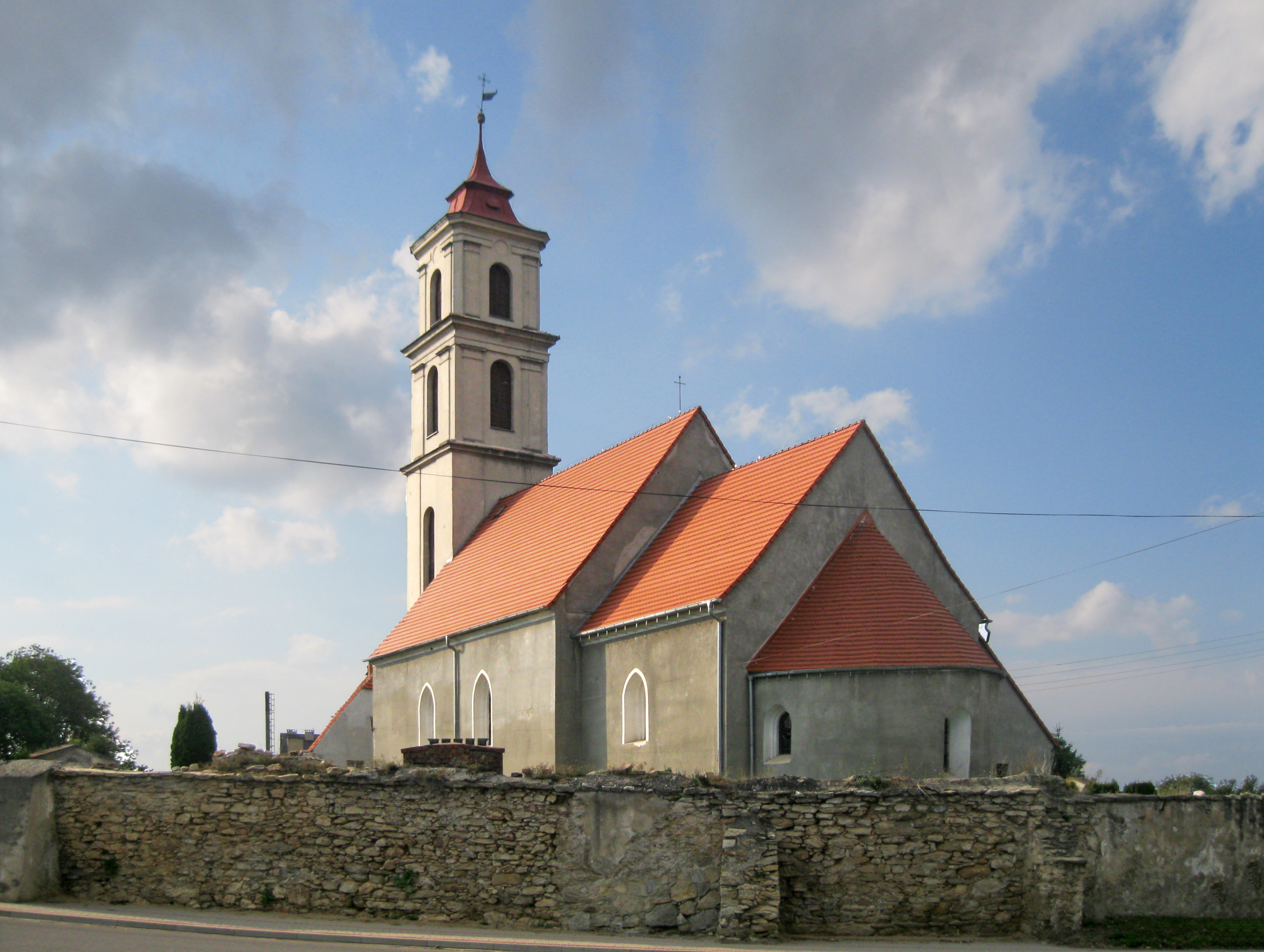 Pastuchów - romański kościół parafialny p.w. św. Barbary (zabytek nr rejestr. A/1759/1194 z dn. 14.12.1964)